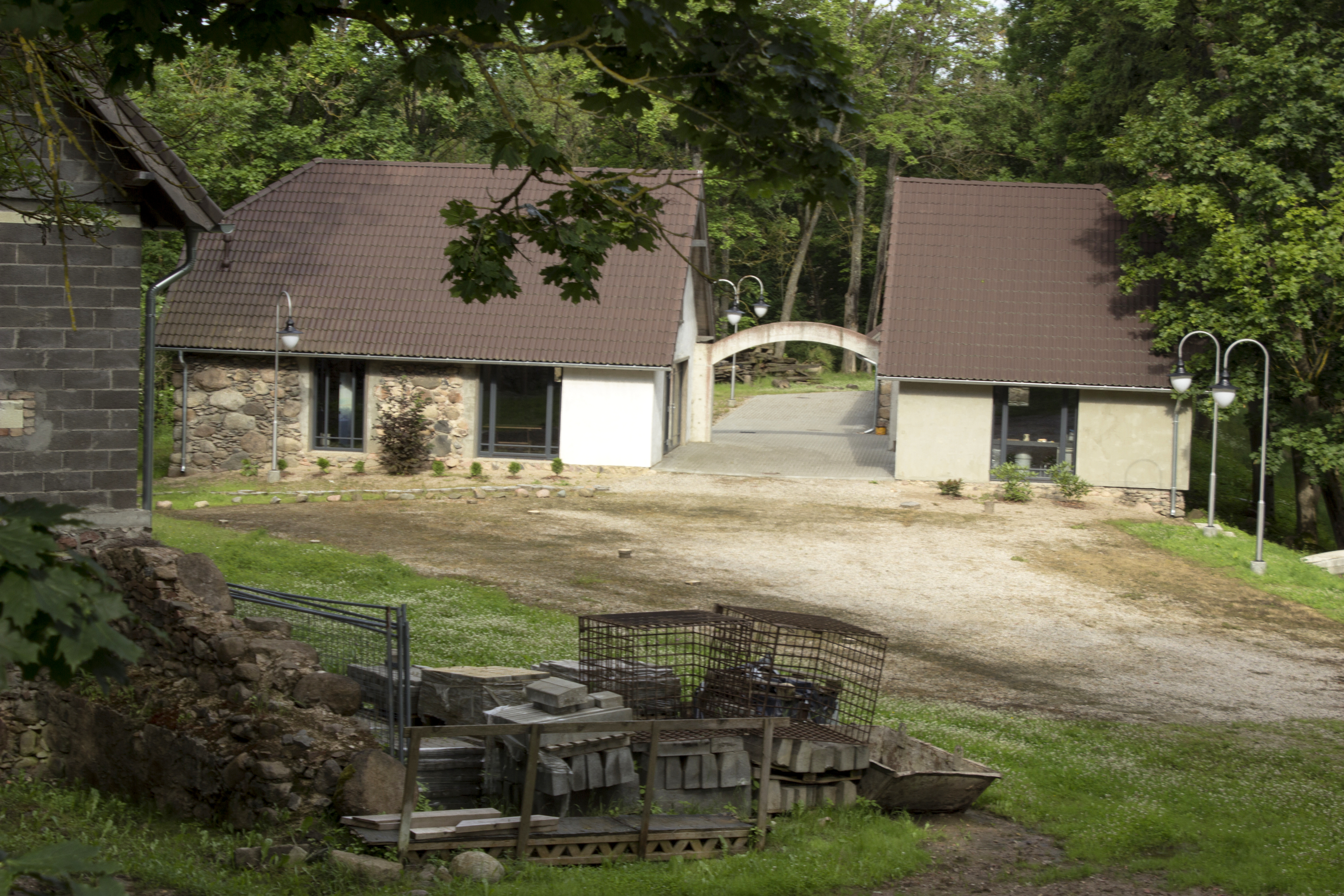 Zemītes dzirnavas / mill